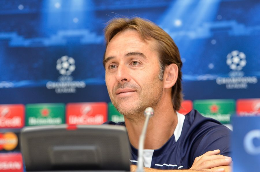 Хулен Лопетегі під час роботи з Порту